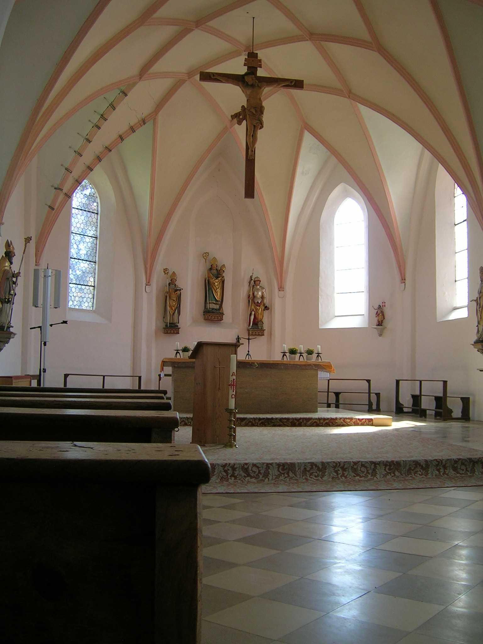 Wallfahrtskirche St. Alban in der Gemeinde Hörgertshausen: AltarThis is a photograph of an architectural monument.